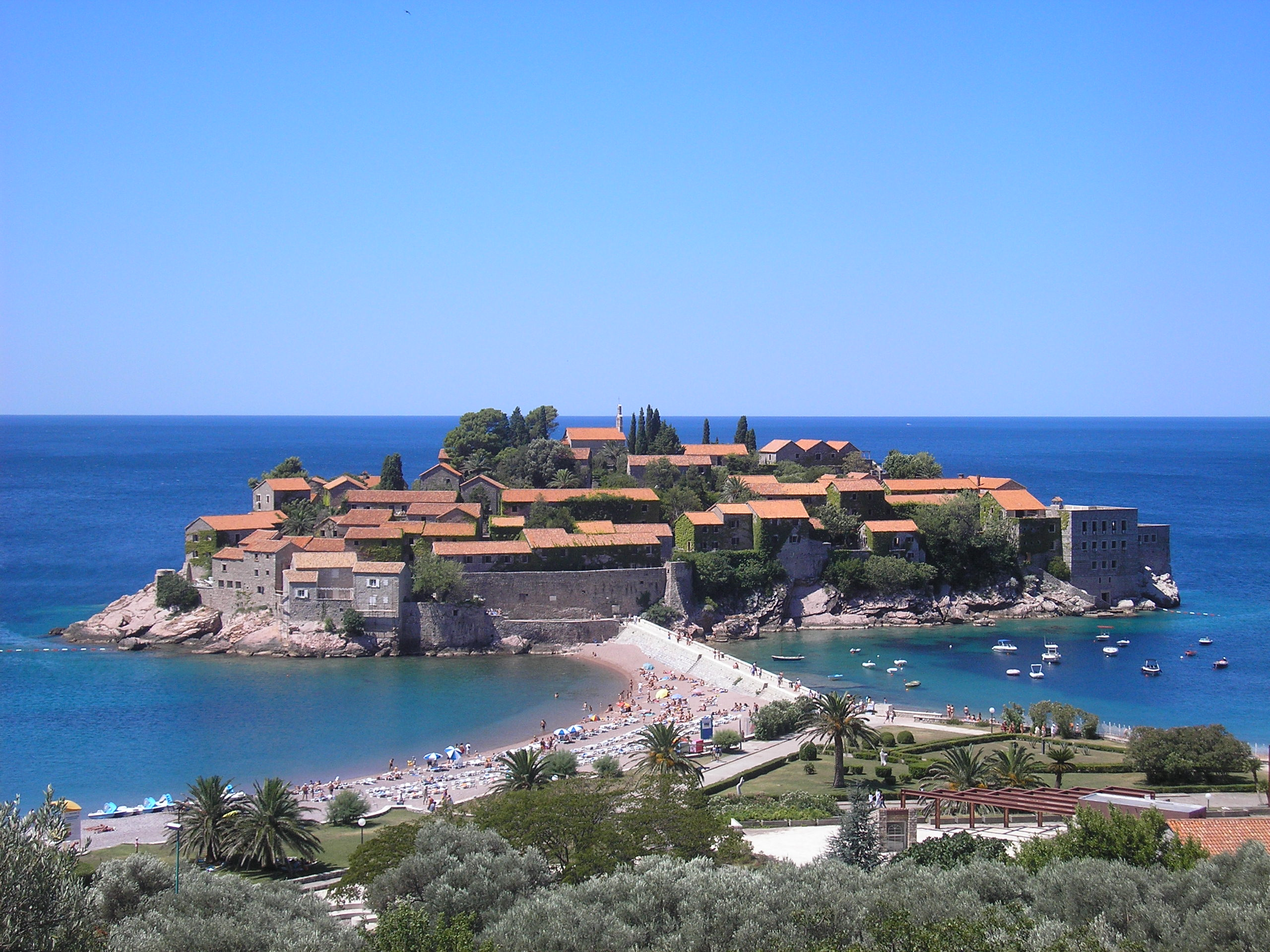 Sveti Stefan, Montenegro